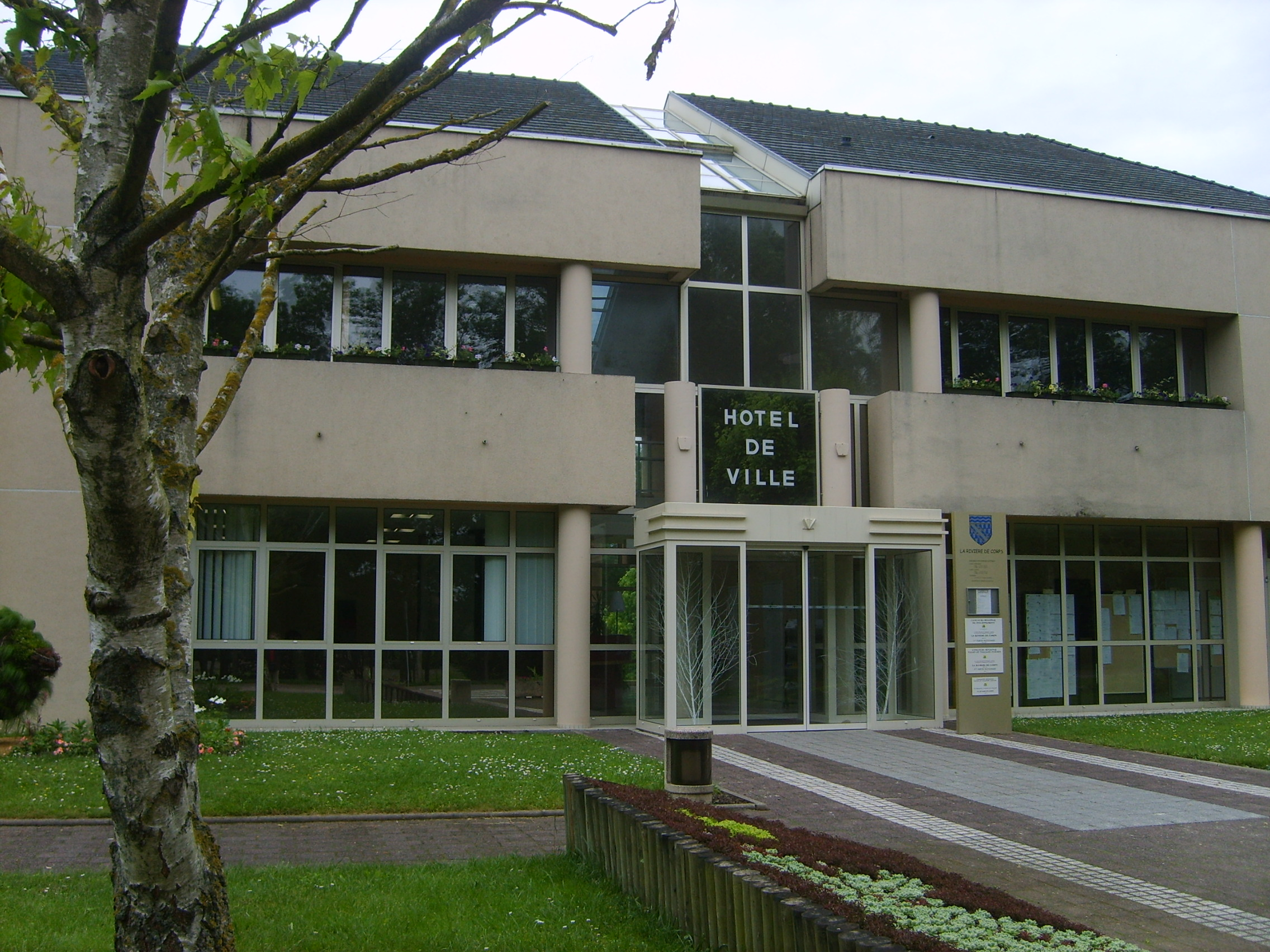 Hotel de ville de La-Rivière-de-corps dans le département de l'Aube (France)